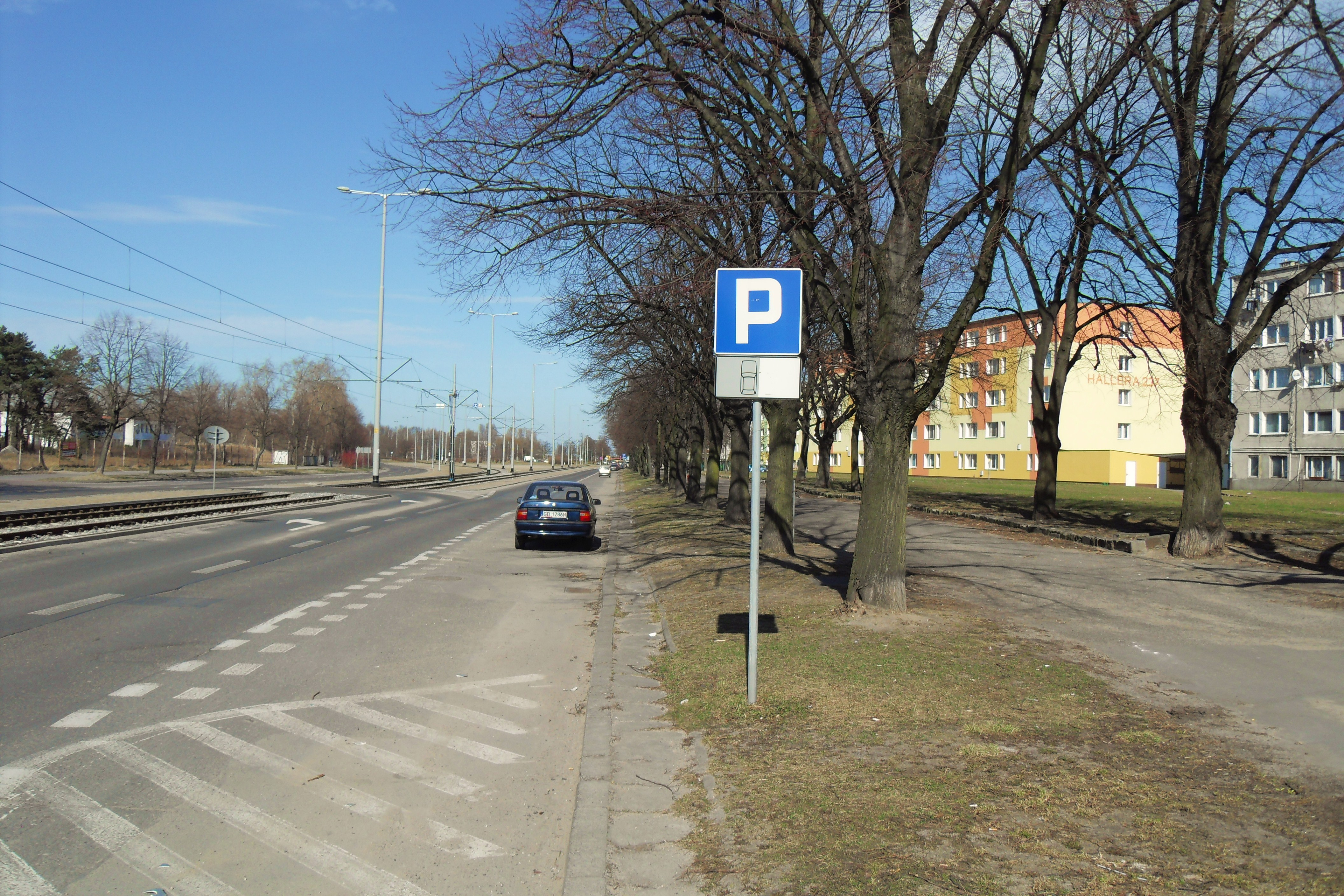 Gdańsk Brzeźno, al. Hallera.